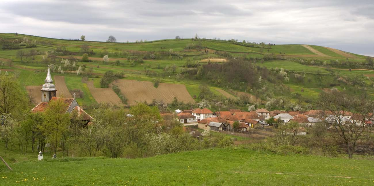 Biserica de lemn din Hinchiriş, Bihor.